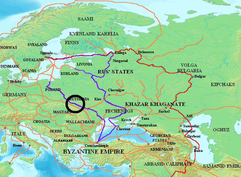 Lokalizacja Grodów Czerwieńskich na mapie szlaków handlowych w VIII-XI wiekach. Szlak "od Waregów do Greków" zaznaczono na fioletowo (odnoga grecka) oraz na czerwono (odnoga saraceńska). Pozostałe szlaki na pomarańczowo.